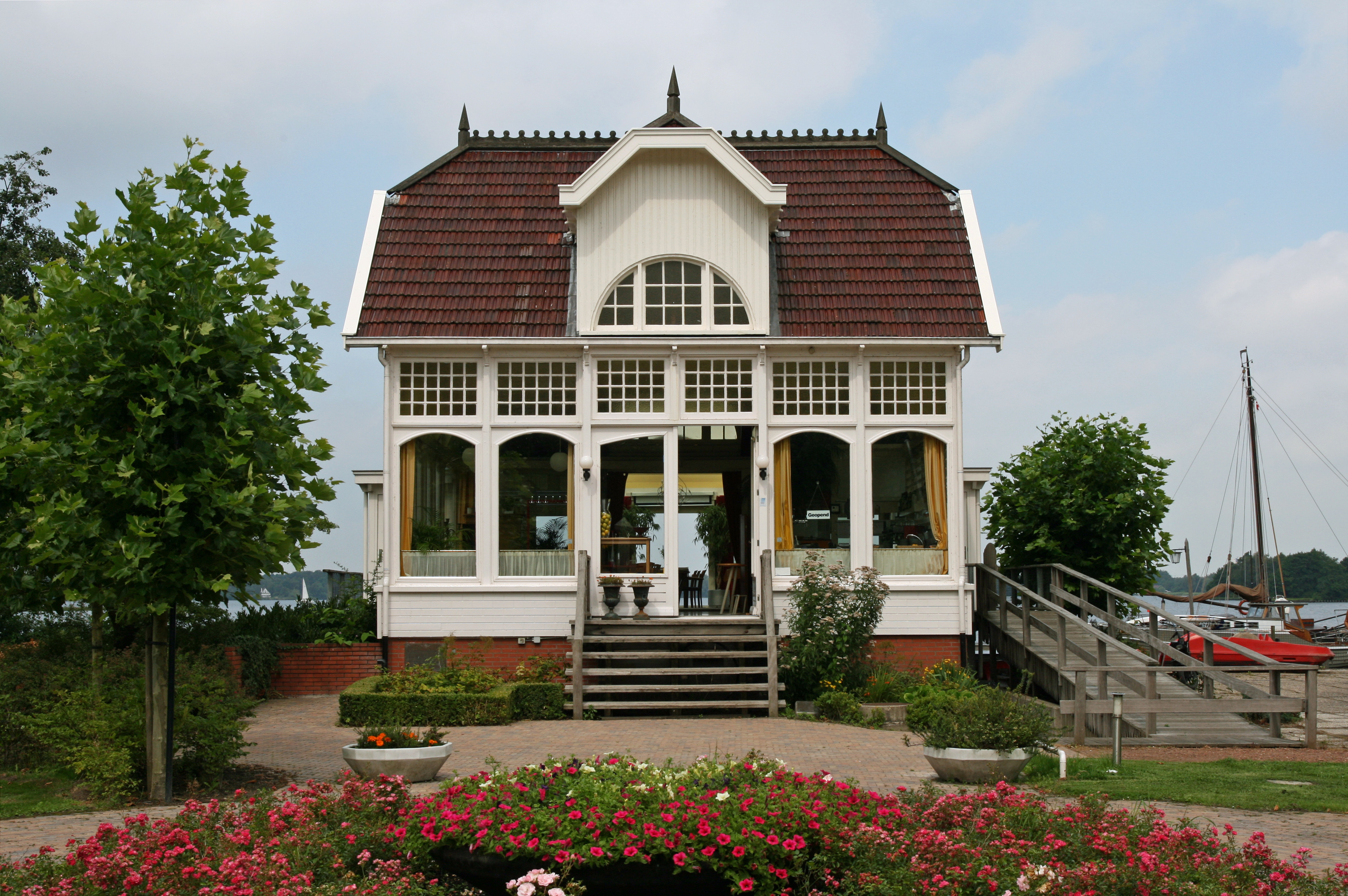 Restaurant de Paalkoepel bij het Paterswoldsemeer (Groningen, Nederland). Ontworpen als theehuis door Willem Albert Scholten in 1908. Toegangsdeuren later verfraaid met vensters in jugendstilmotieven. Tussen 1970 en 1983 sterk vervallen. In 1983 met overheidsgelden gerestaureerd door het Meerschap Paterswolde. sinds 1984 in gebruik als restaurant.